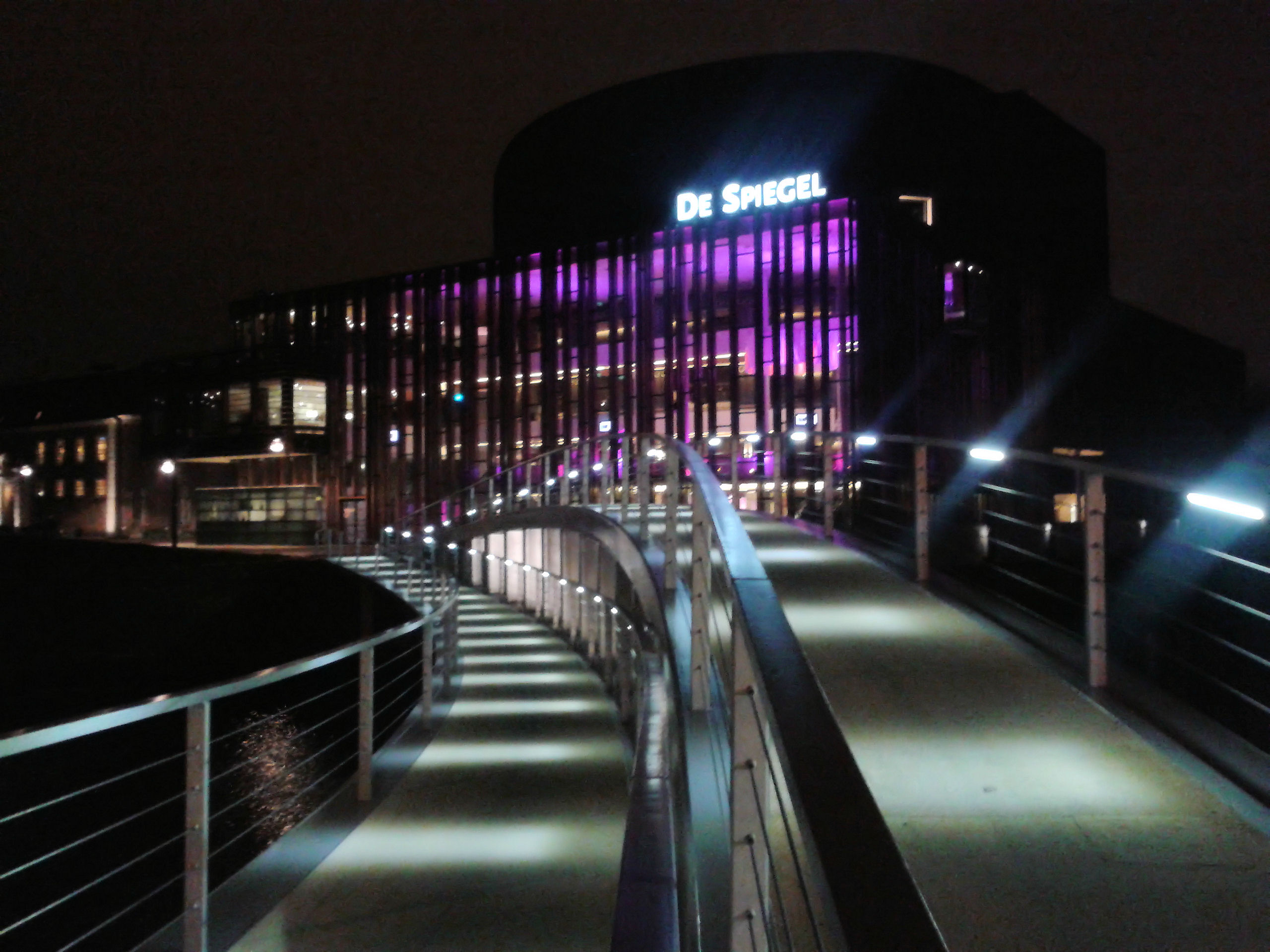 Brug over de Zwolse stadsgracht naar Theater de Spiegel, deze is gebouwd in 2011.